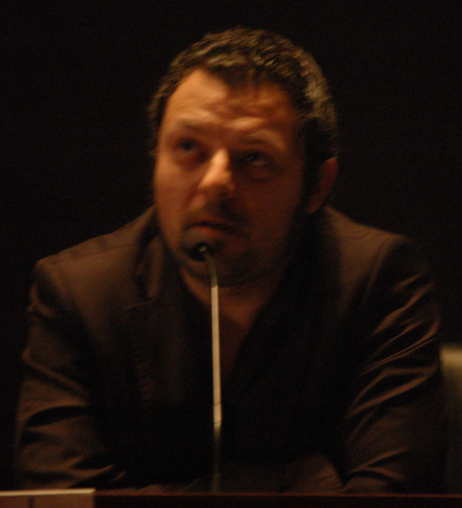 David Rubín no I Simposio Ecolingua